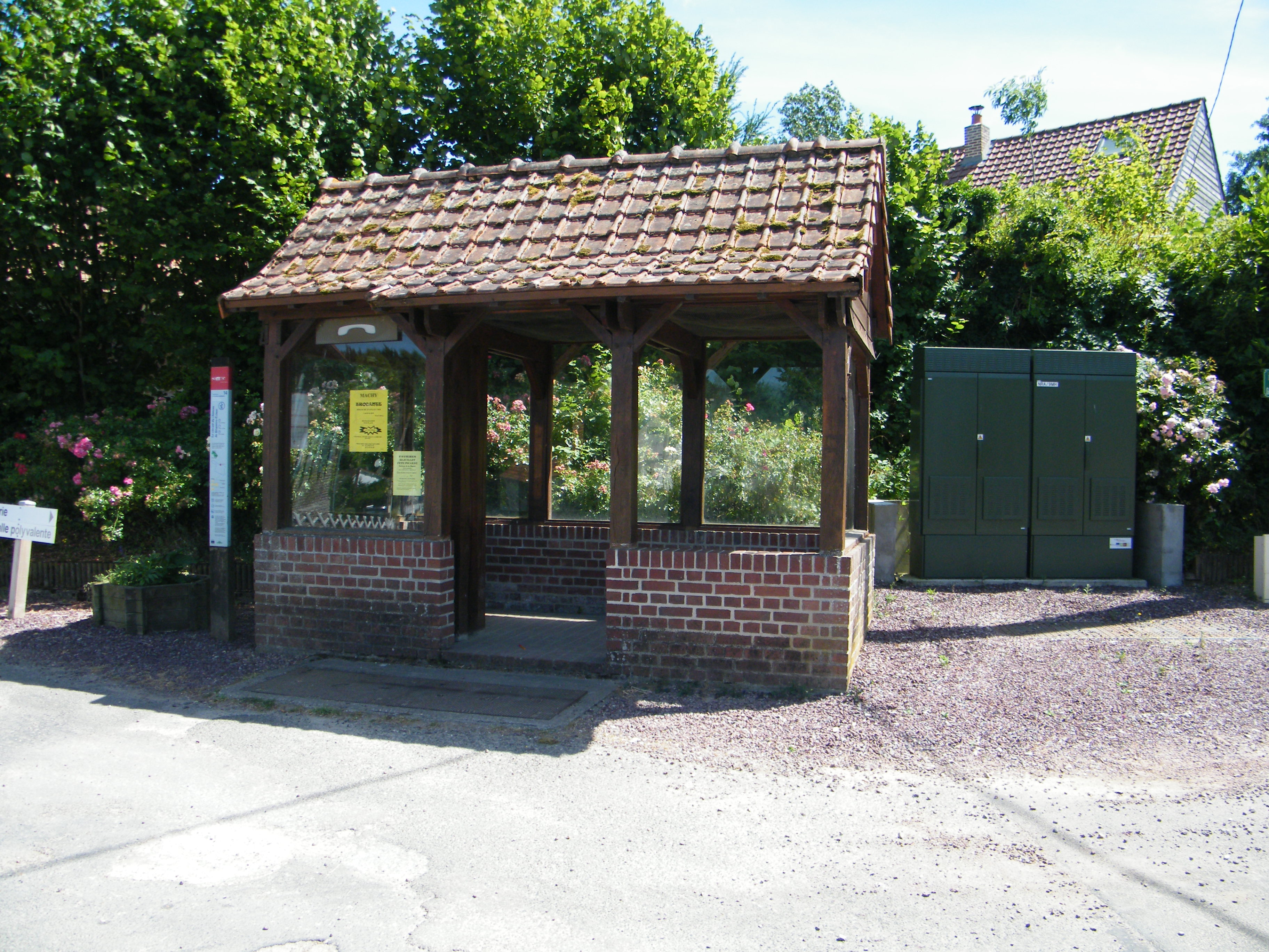 Abribus à Machy (Somme), France.